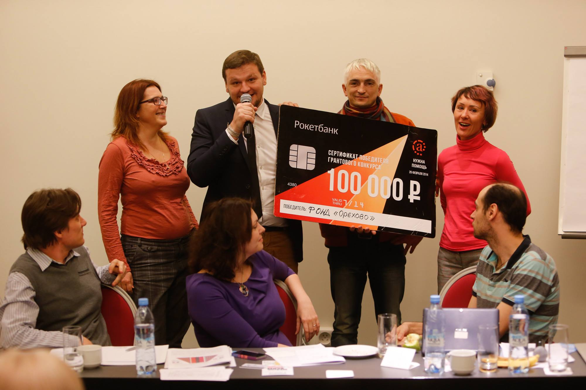 Центр "Орехово" получает грант от руководителя проекта "Благотворительные гастроли" Мити Алешковского